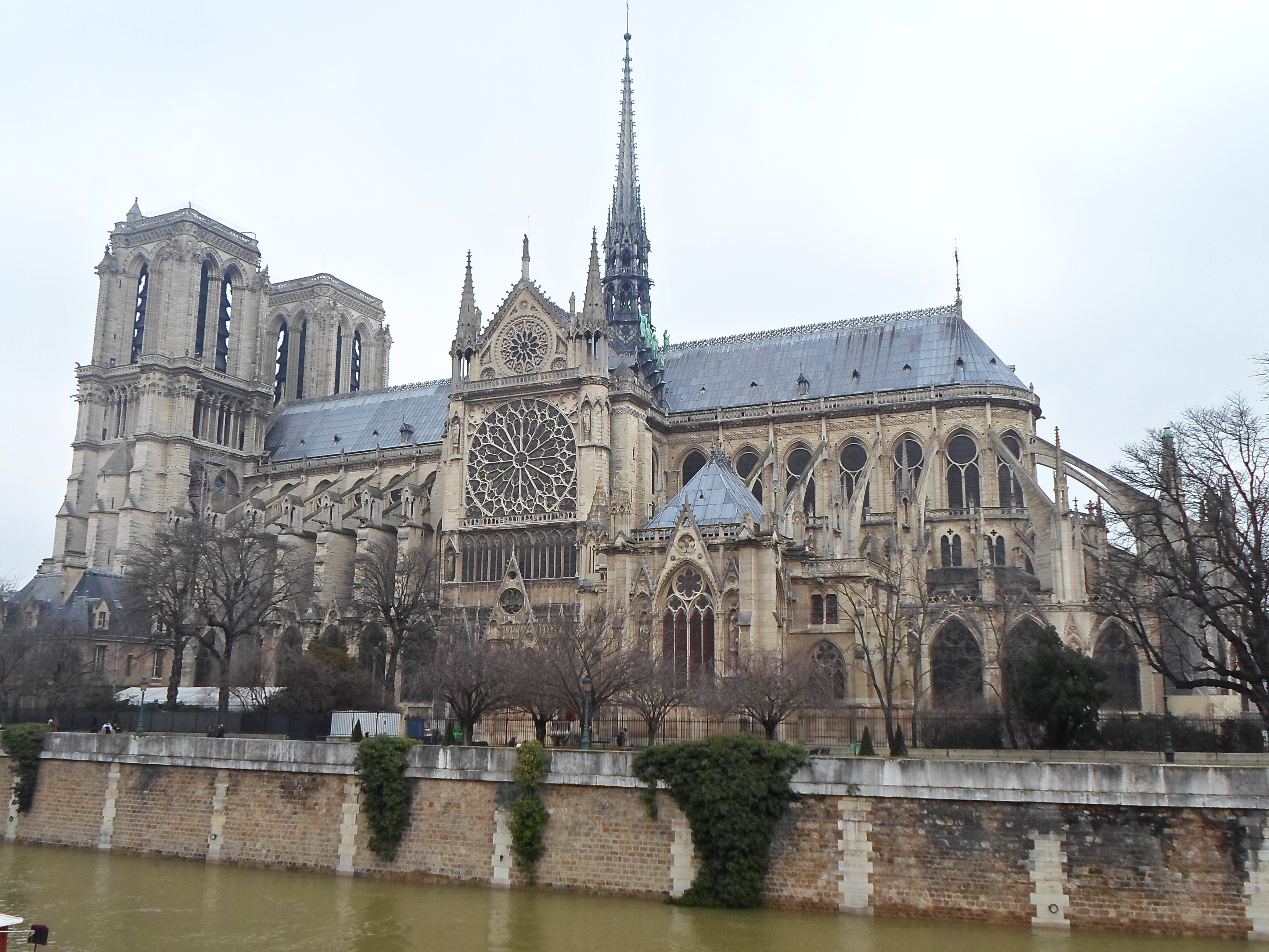 Notre Dame von Süden